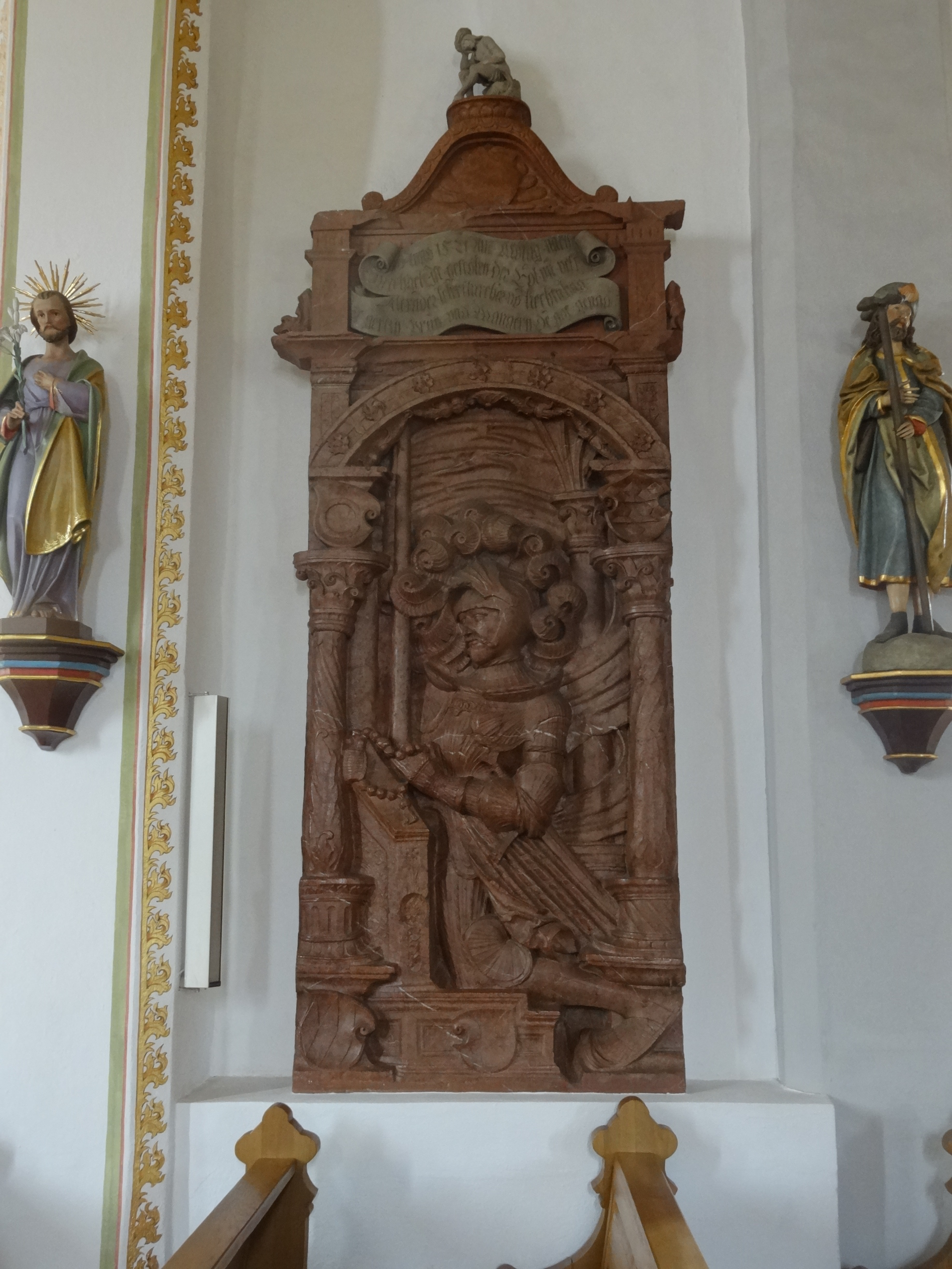 Rotmarmorepitaph in der röm.-kath. Pfarrkirche St. Georg in Gerzen (Lkr. Landshut, Bayern)